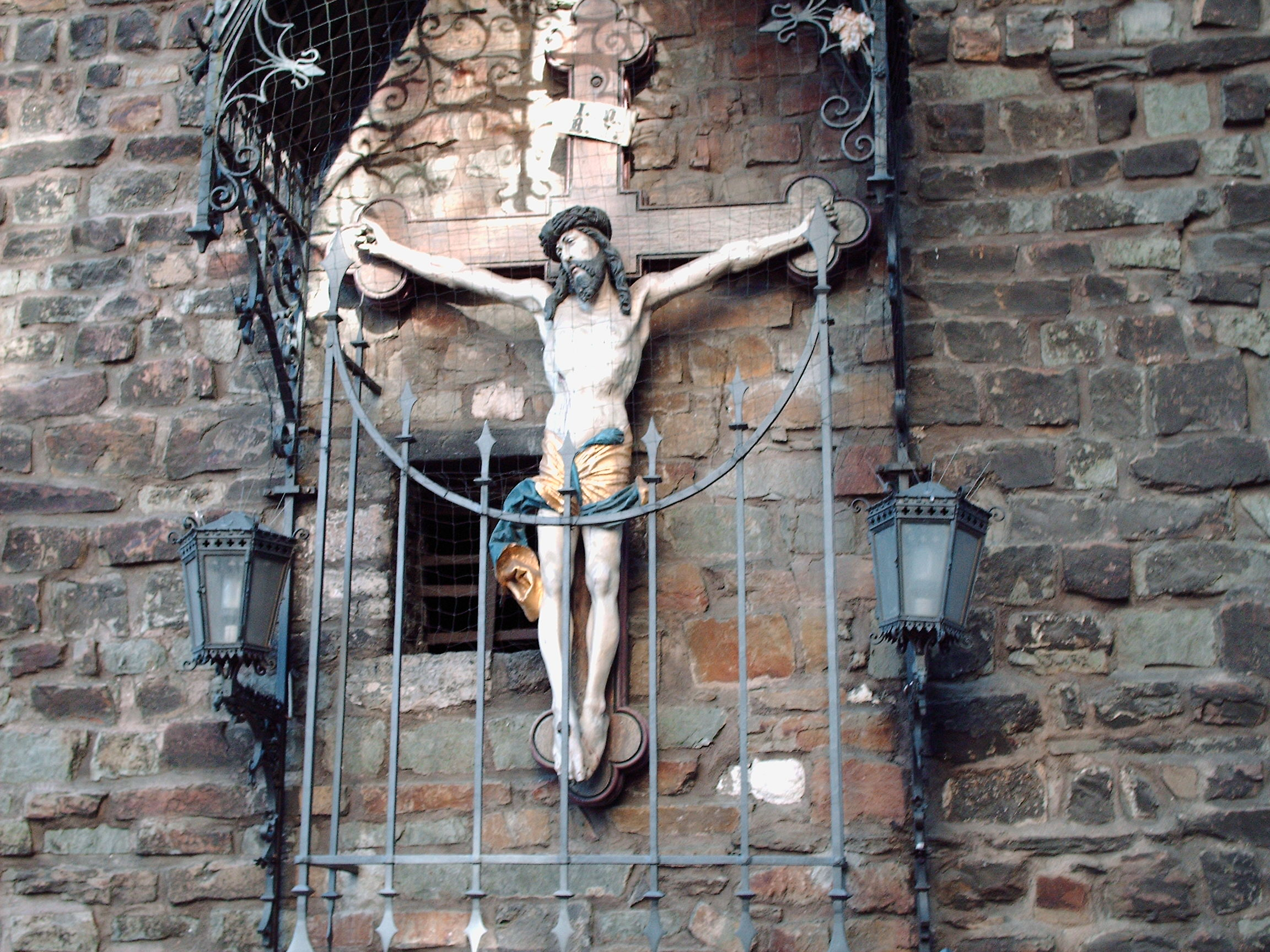 Beeld van Jezus in Aken